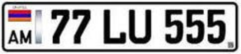 Номерной знак Армении с середины 2014 года